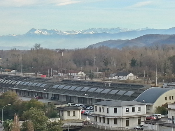 La gare de Pau et une partie de la chaîne des Pyrénées, vue depuis la montée vers le boulevard des Pyrénées.